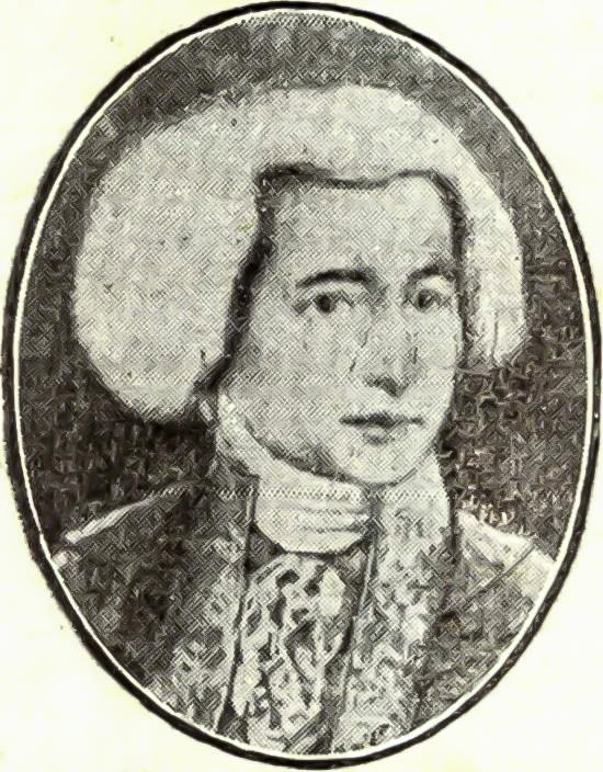 Caetano Pinto de Miranda Montenegro, marquês de Vila Real da Praia Grande